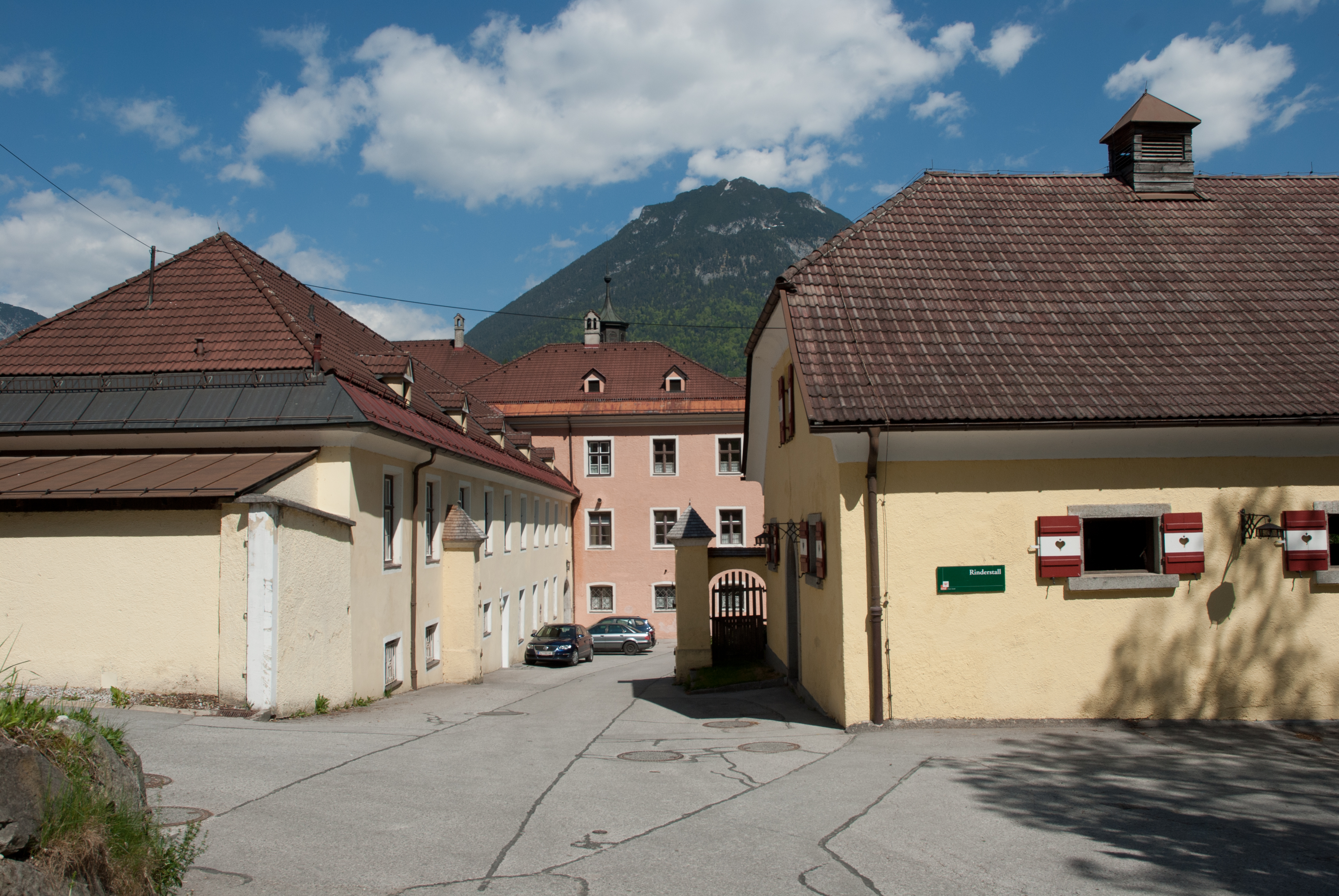 Landwirtschaftliche Lehranstalt Rotholz